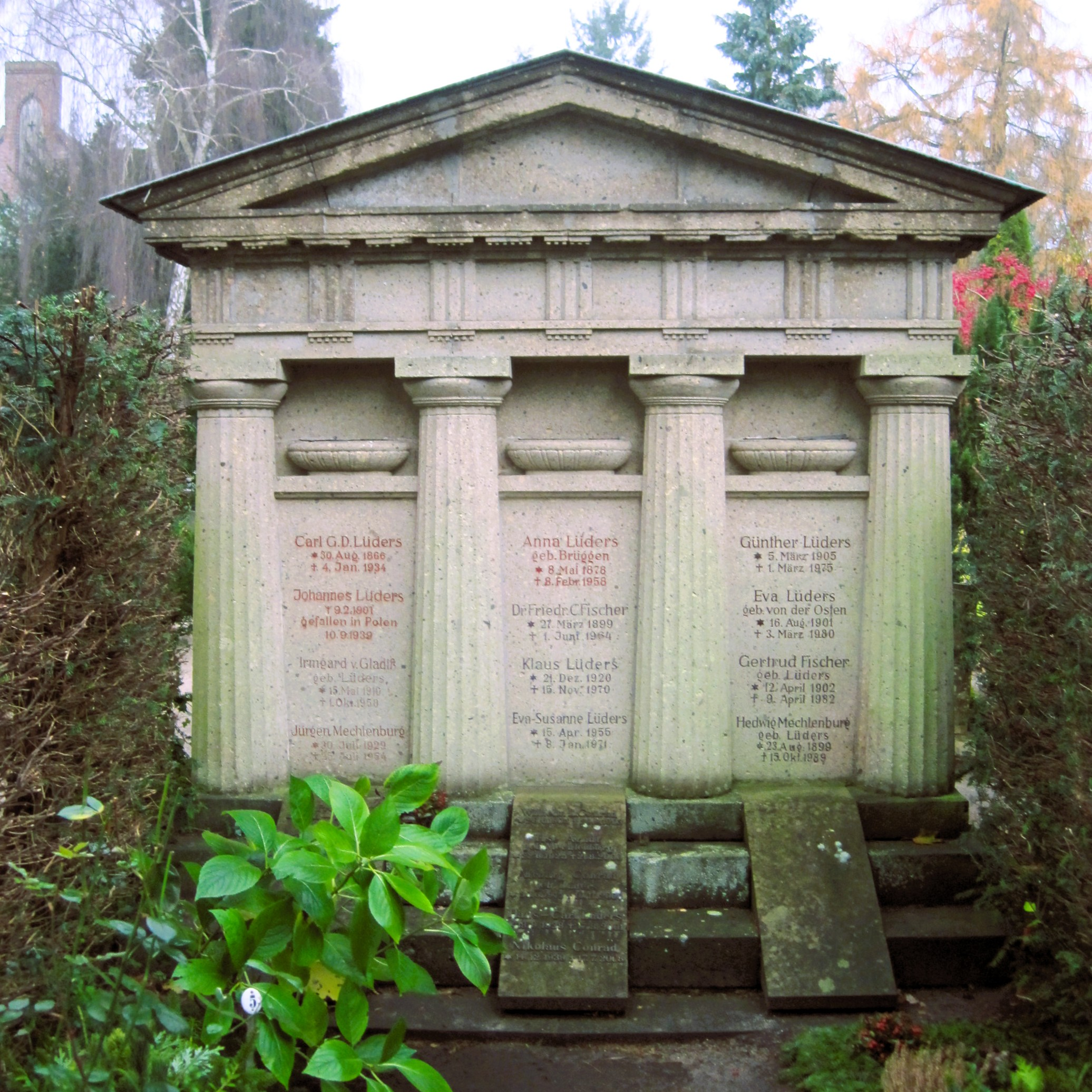 Grabstätte der Familie Lüders auf dem Burgtorfriedhof in Lübeck